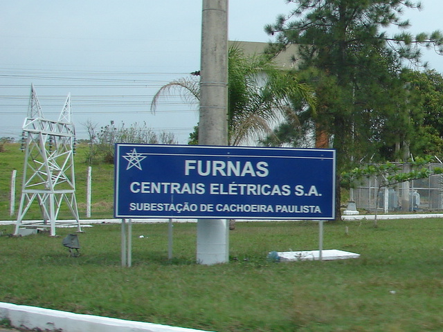 Subestação de Furnas Centrais Elétricas em Cachoeira Paulista - SP Autor: A. G. Freitas Neto Data: 16/09/2006 Fonte: Arquivo Particular OBS: Foto tirada com equipamento digital Sony H2 resolução 640x480 (alterada)